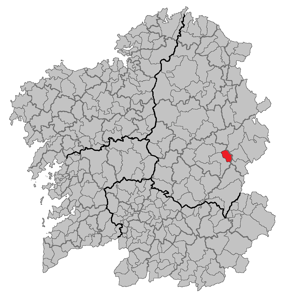 Mapa coa localización do concello de Triacastela.